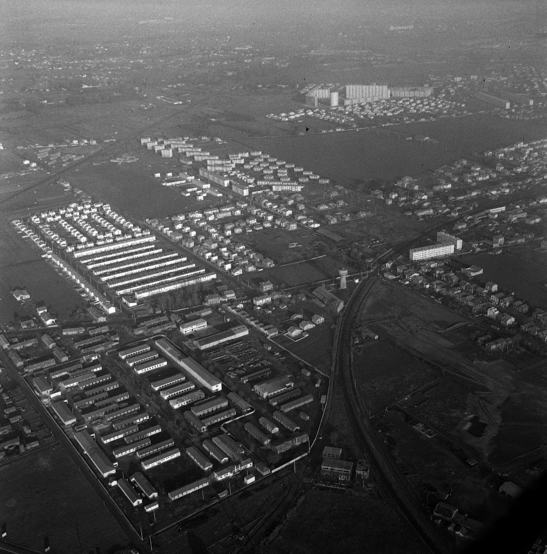 Une partie de Toulouse. Le 15 Février 1961. Vue aérienne d'une partie de Toulouse, avec au centre un grand entrepôt. Croisement de la route de Seysses et de la voie ferrée. La plupart des bâtiments au premier plan, y compris le château d'eau, ont depuis disparu.